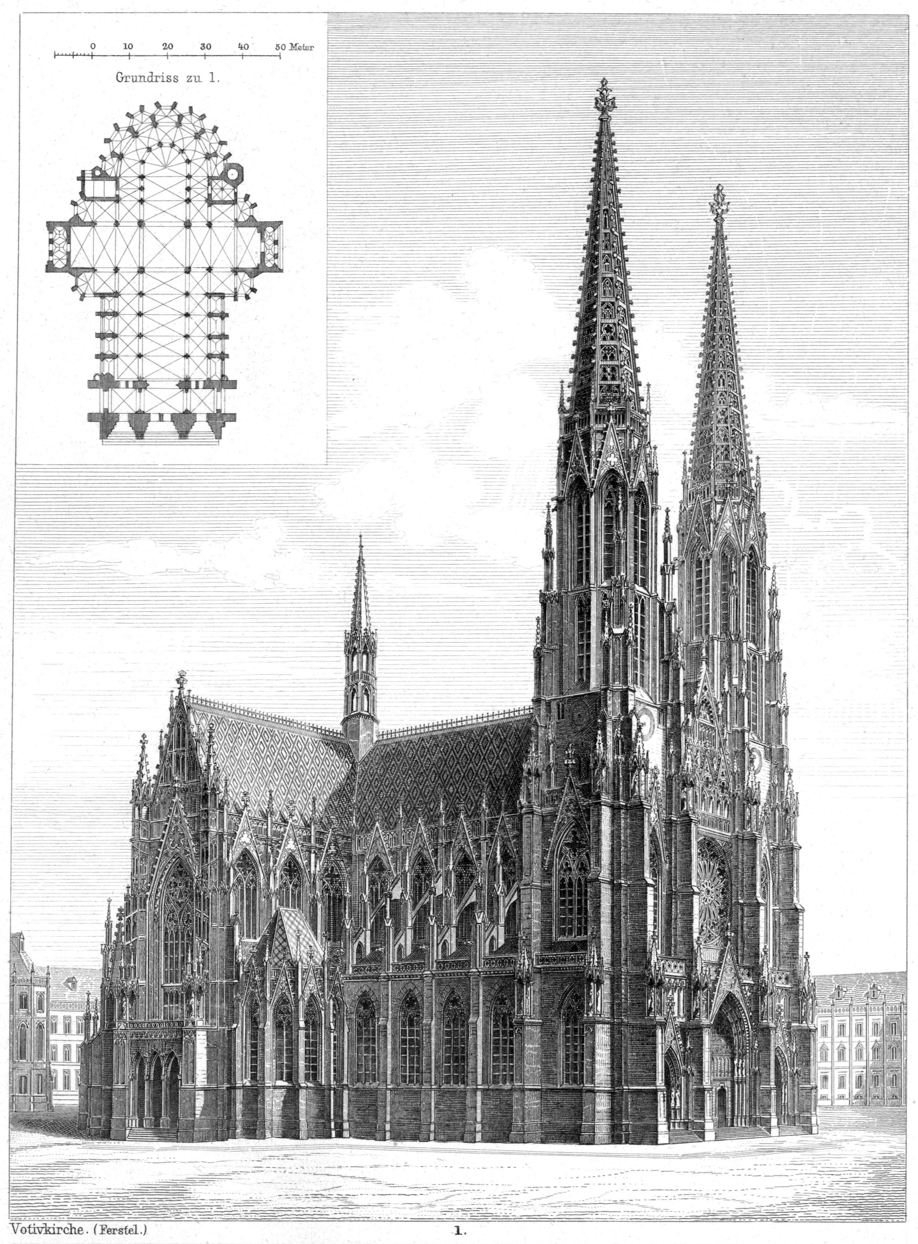 Votivkirche in Wien, Architekt: Ferstel